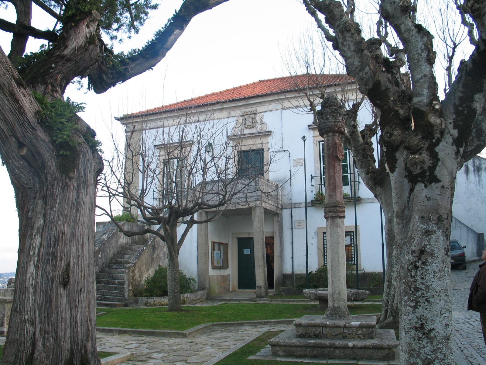 Ourém (Portugal) - ancient Town Hall